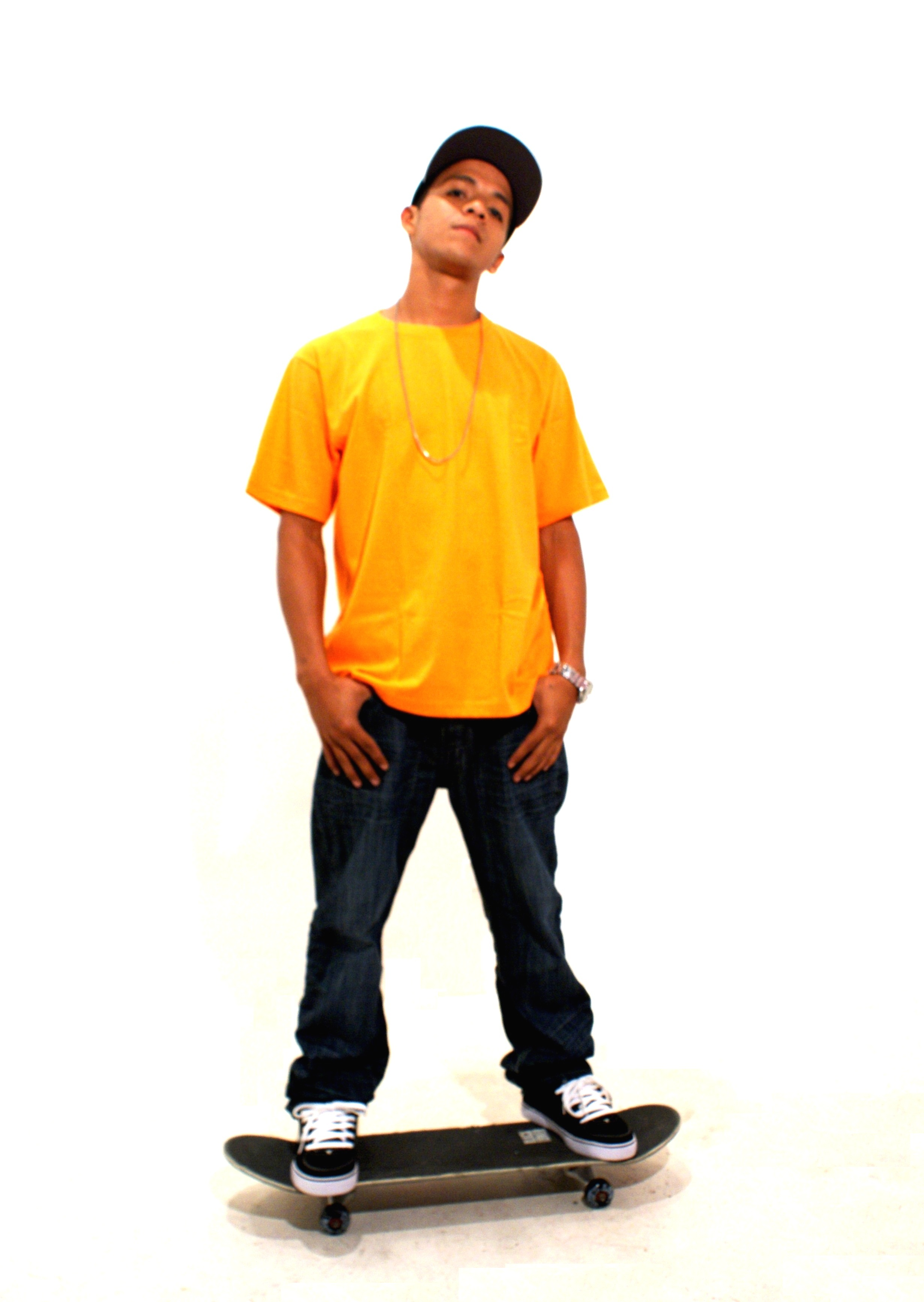 Luis Ruiz , skater